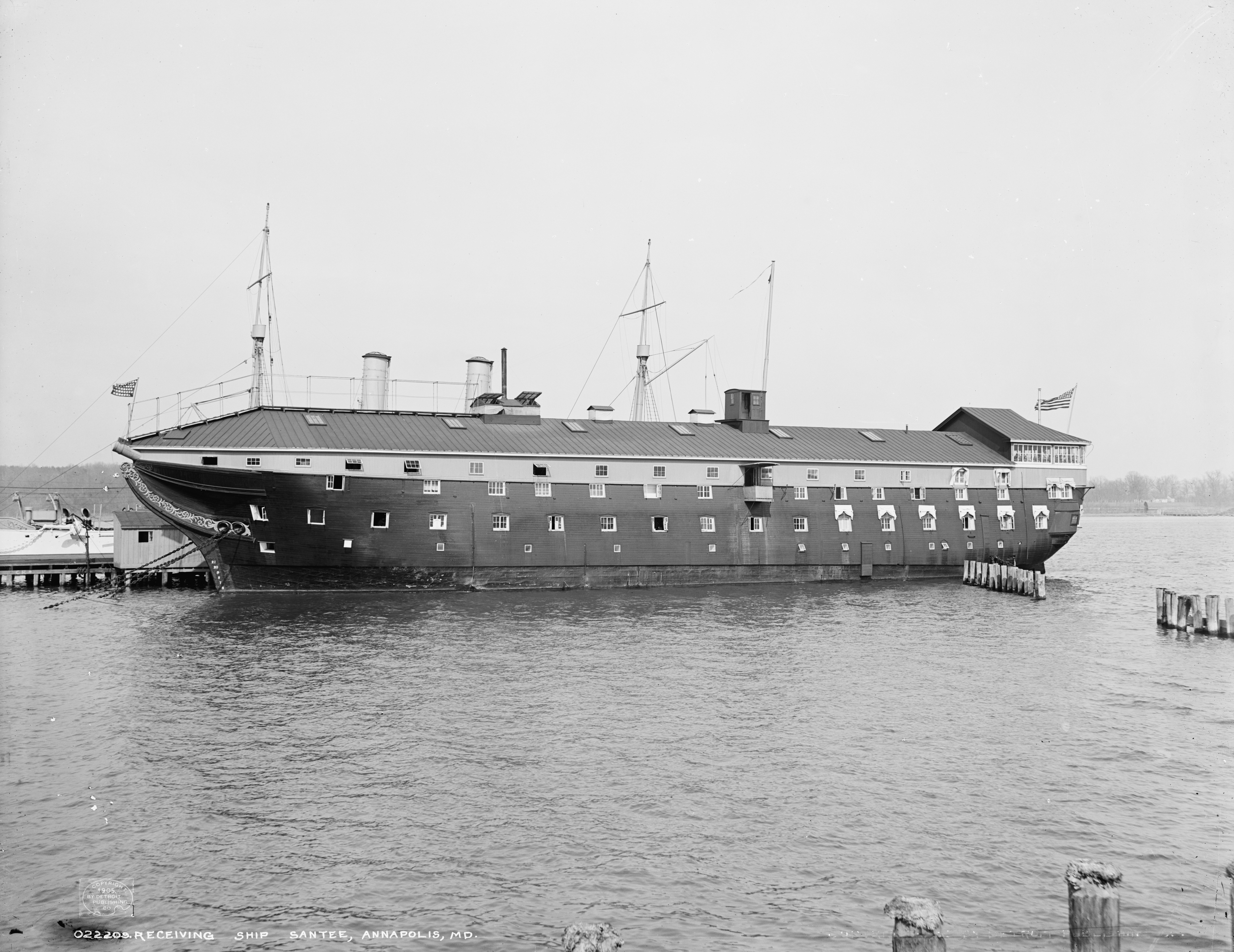 USS Santee